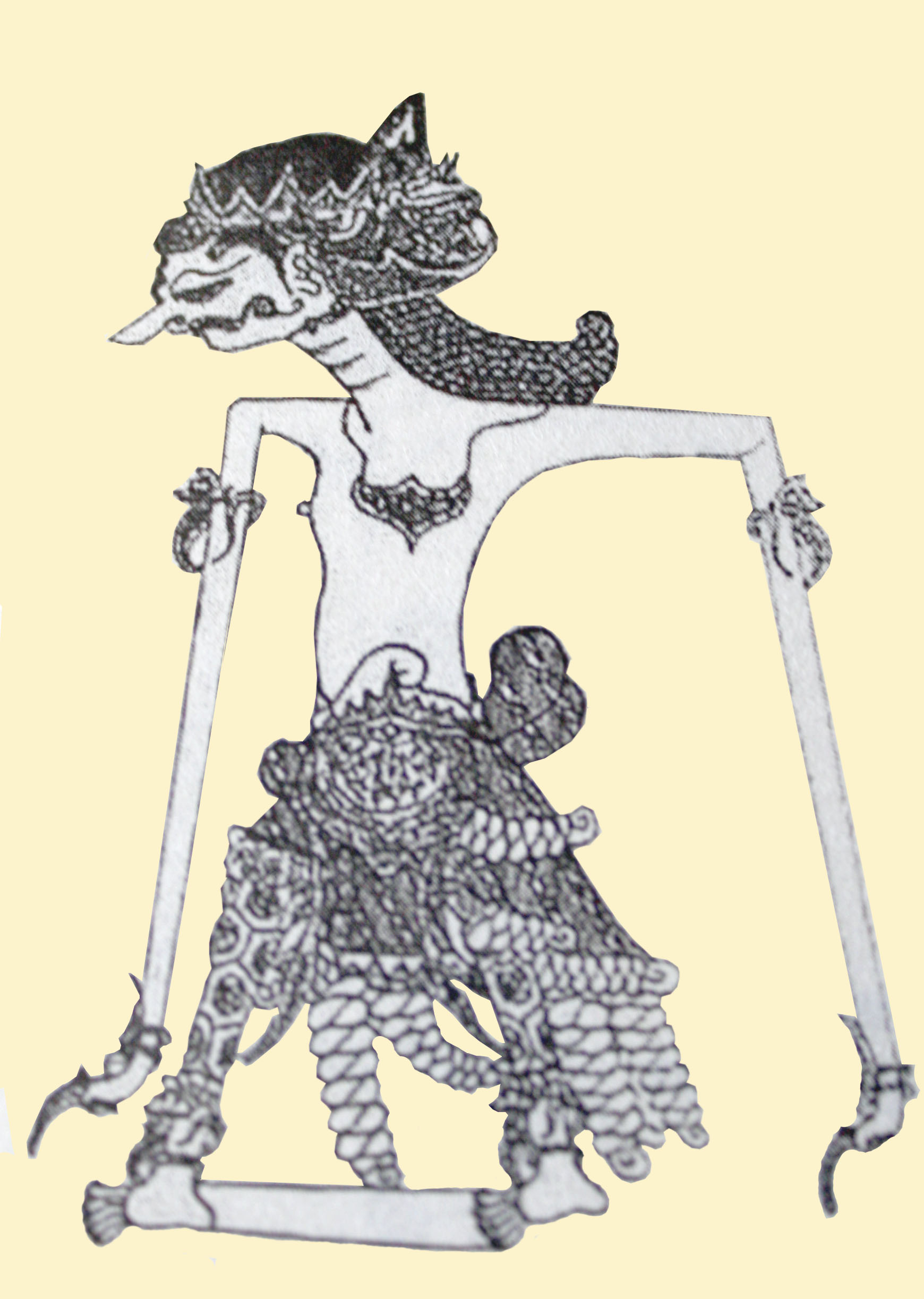 Paraga wayang seratus korawa dan salah satunya adalah Adityaketu